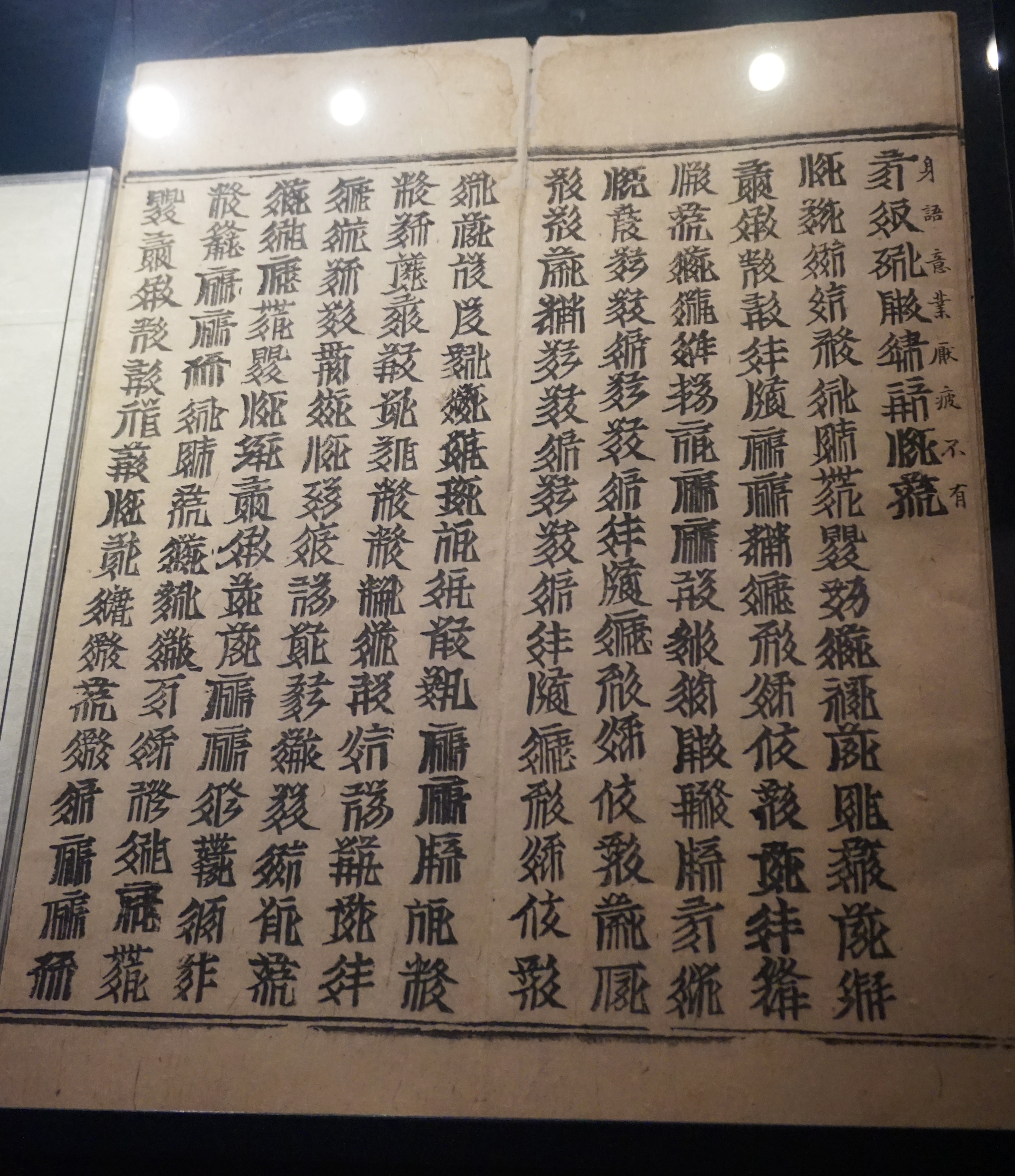 西夏文活字印本《大方广佛华严经典普贤行品》。甘肃省博物馆藏。